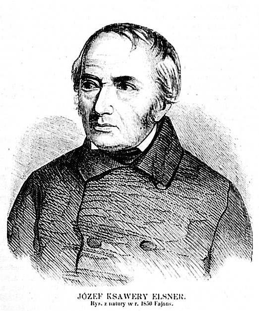 Józef Ksawery Elsner 1769-1854